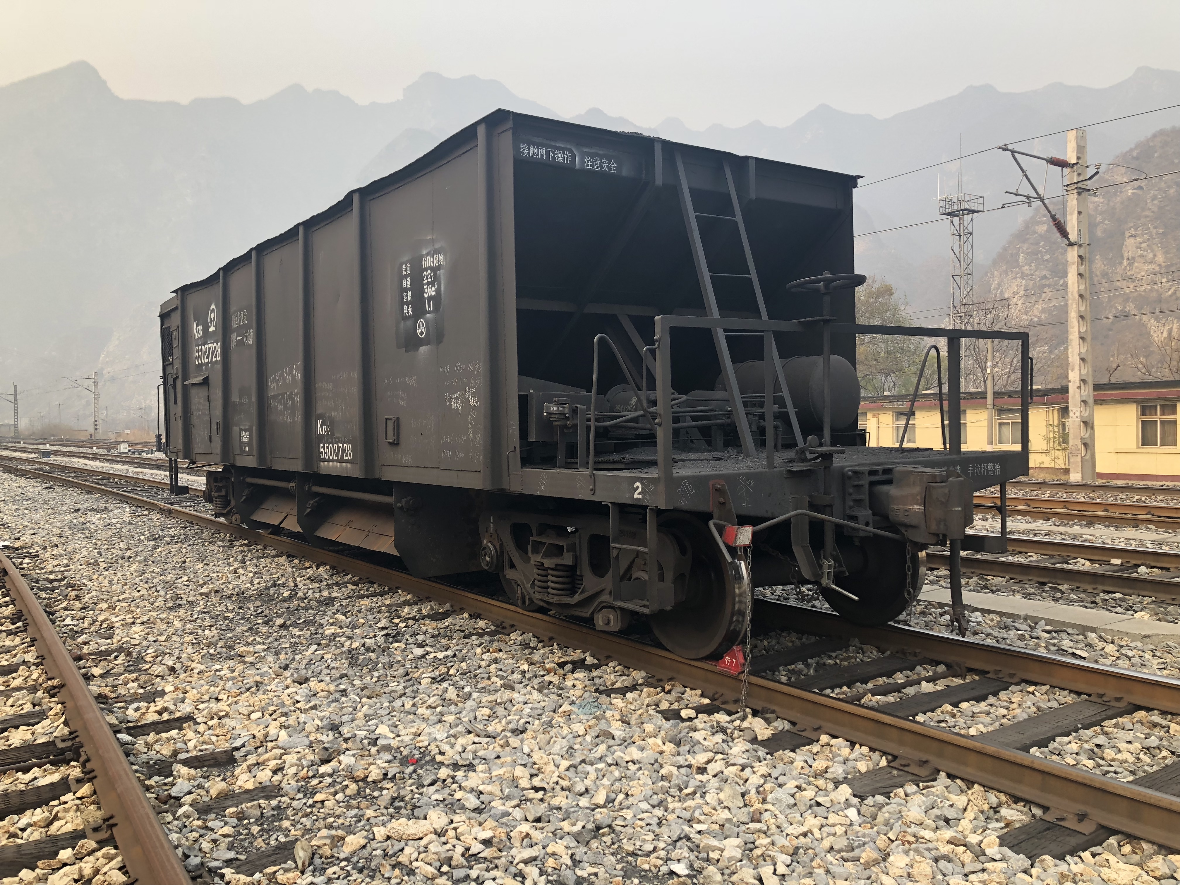 中文（中国大陆）: 落坡岭站上的K13K型石砟漏斗车